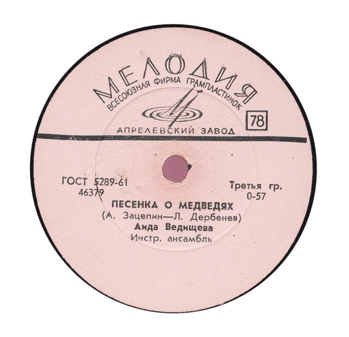 Пластинка фирмы Мелодия "Песенка о медведях"